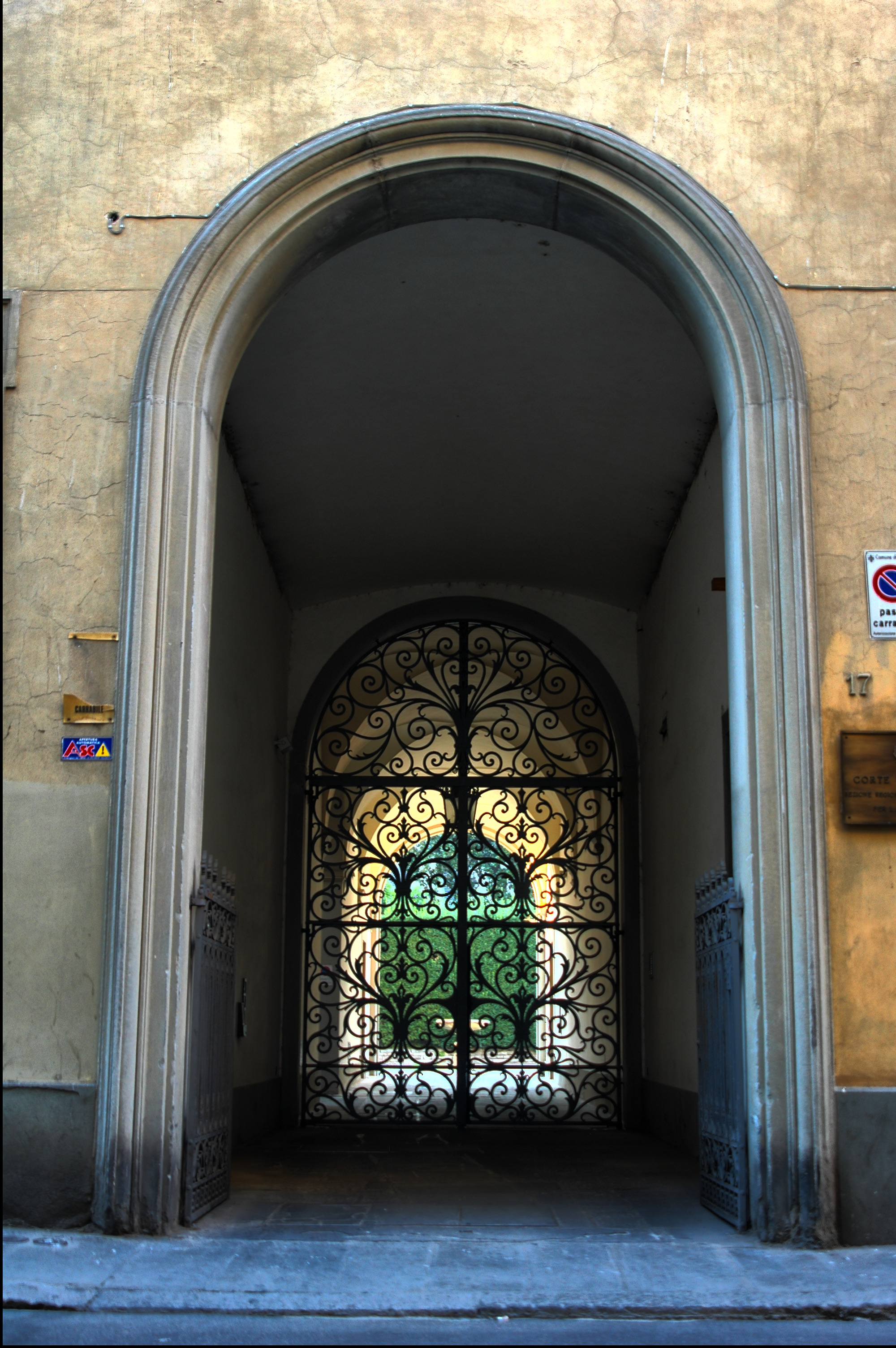 doorway